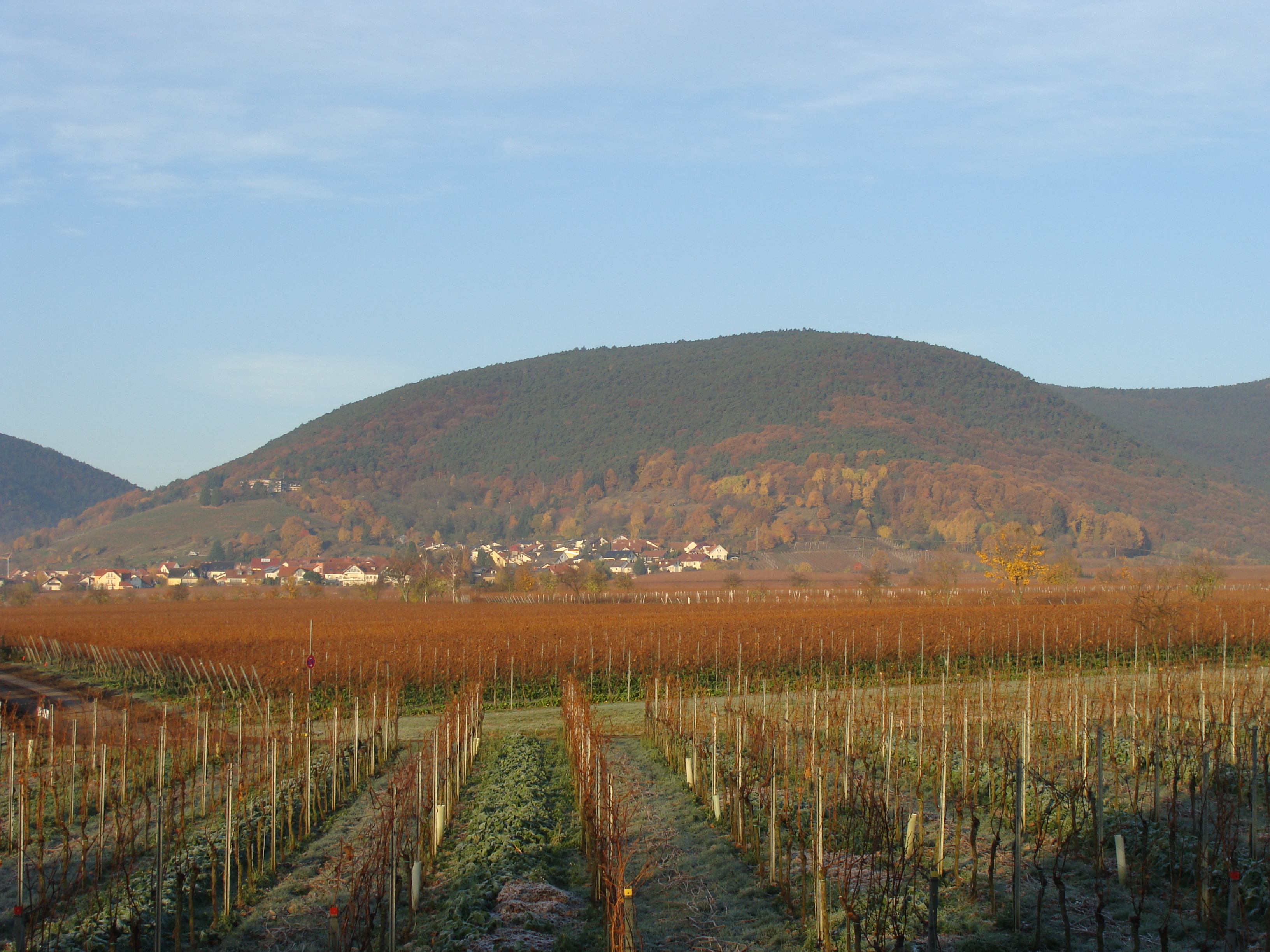 Breitenberg (Haardt) im Pfälzerwald